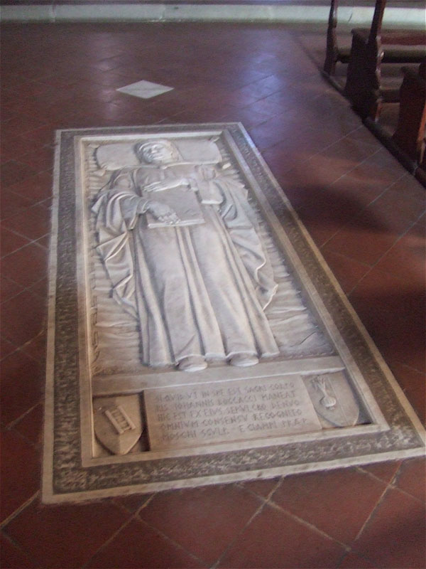 Stèle à Boccace à Certaldo Alto (Toscane) - Italie.